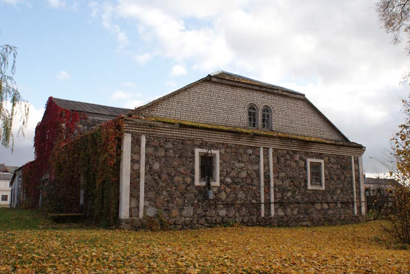 Noriūnų dvaro svirnas